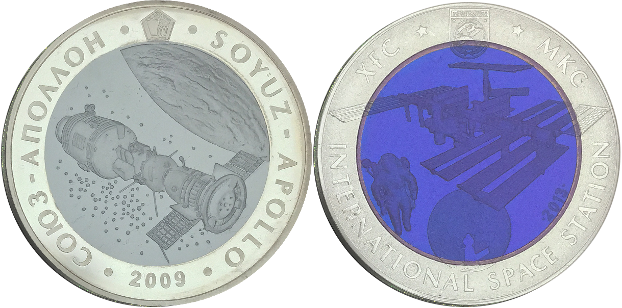 Monedas de 500 tenge con centro de tantalio